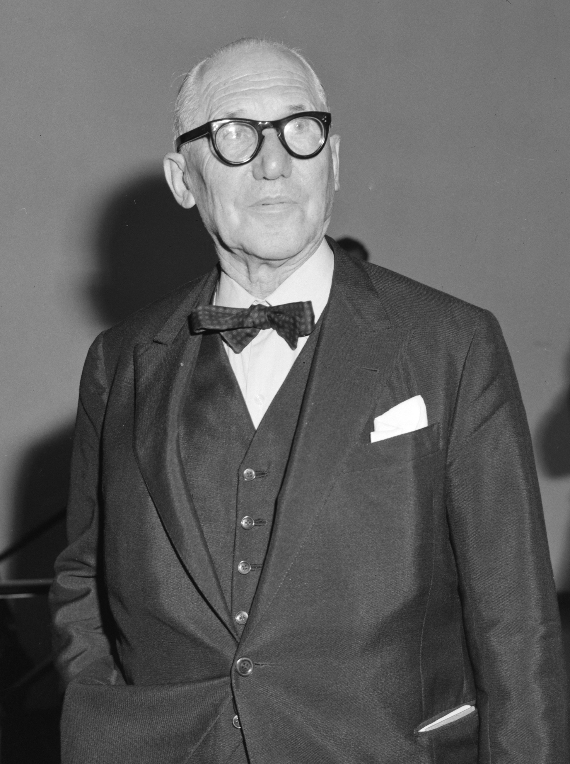 Collectie / Archief : Fotocollectie Anefo Reportage / Serie : [ onbekend ] Beschrijving : Le Corbusier. In Stedelijk Museum Sikkensprijzen uitgereikt, Livinus van de Bundt Datum : 26 september 1964 Trefwoorden : Musea, prijzen, uitreikingen Instellingsnaam : Sikkensprijs Fotograaf : Bilsen, Joop van / Anefo Auteursrechthebbende : Nationaal Archief Materiaalsoort : Negatief (zwart/wit) Nummer archiefinventaris : bekijk toegang 2.24.01.04 Bestanddeelnummer : 916-9288